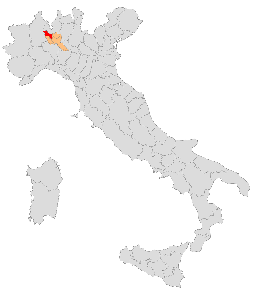 Mappa del circondario di Gallarate nella provincia di Milano (1859-1926)